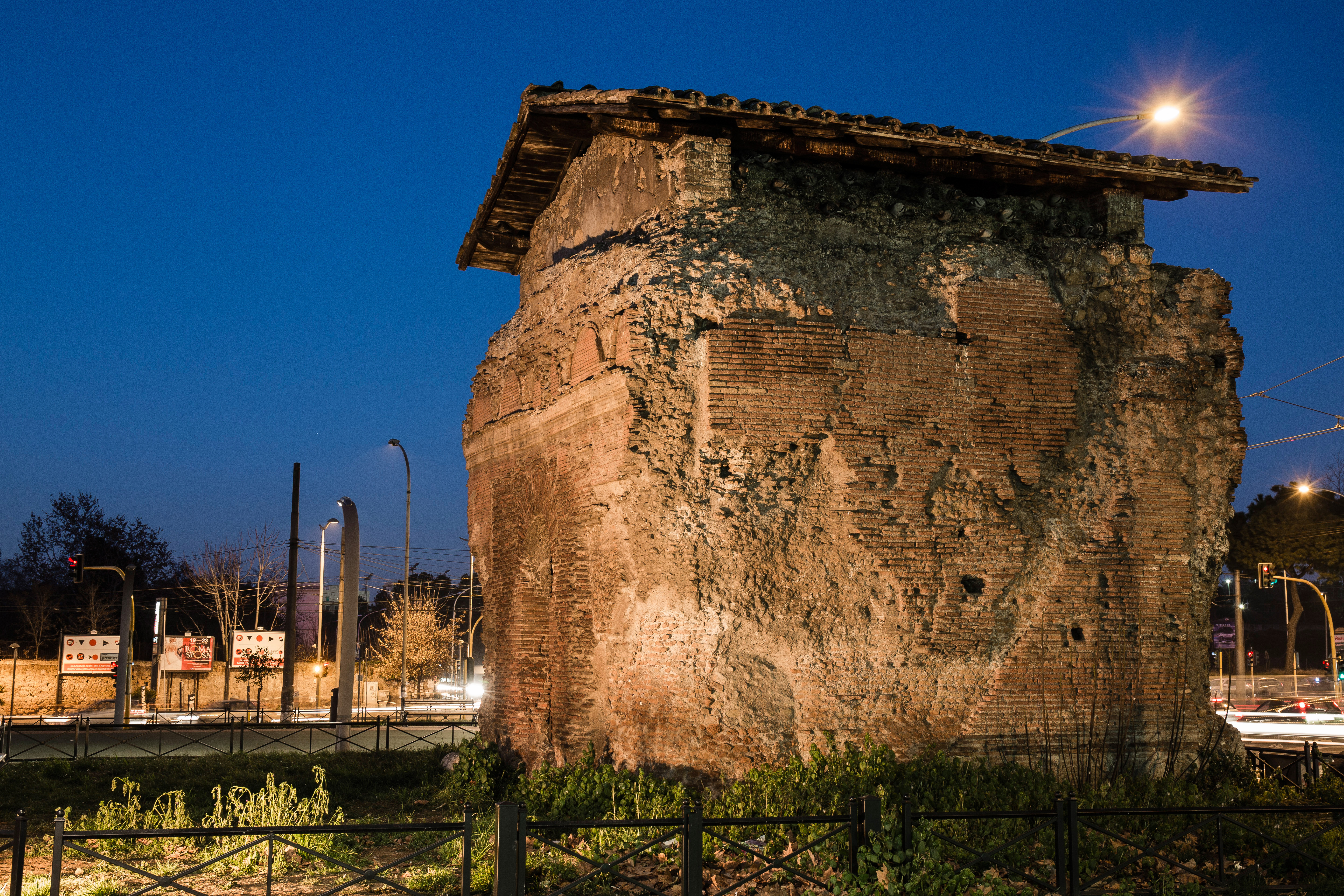 Colombario di Largo Preneste This is a photo of a monument which is part of cultural heritage of Italy.